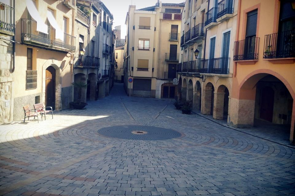 Plaça d'Àngel Marquès, o Plaça Vella, Plaça de la Carnisseria